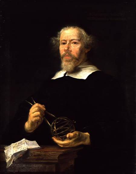 Portrait des Mathematiker Johann Adolf Tassius, Original in der Hamburger Kunsthalle